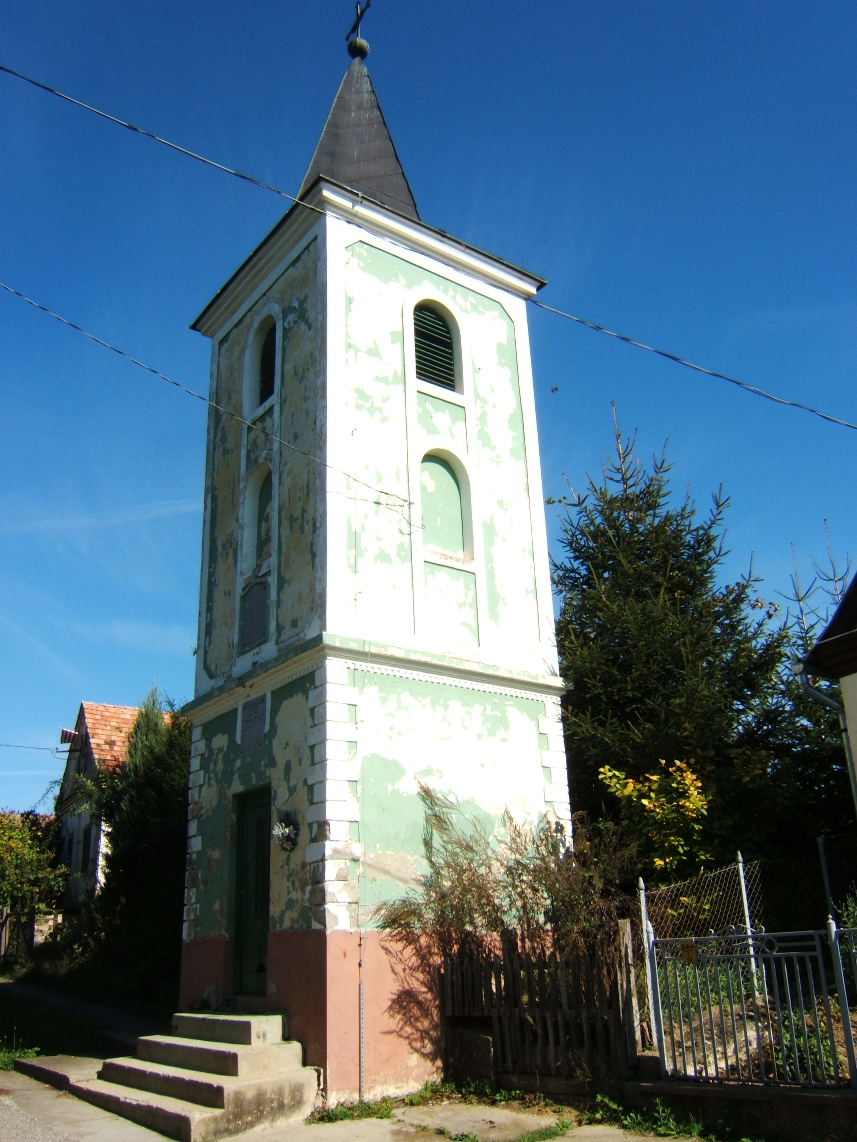 Porrogszentpál, harangtorony. harangtorony. azonosító: -7258. cím Fő u.